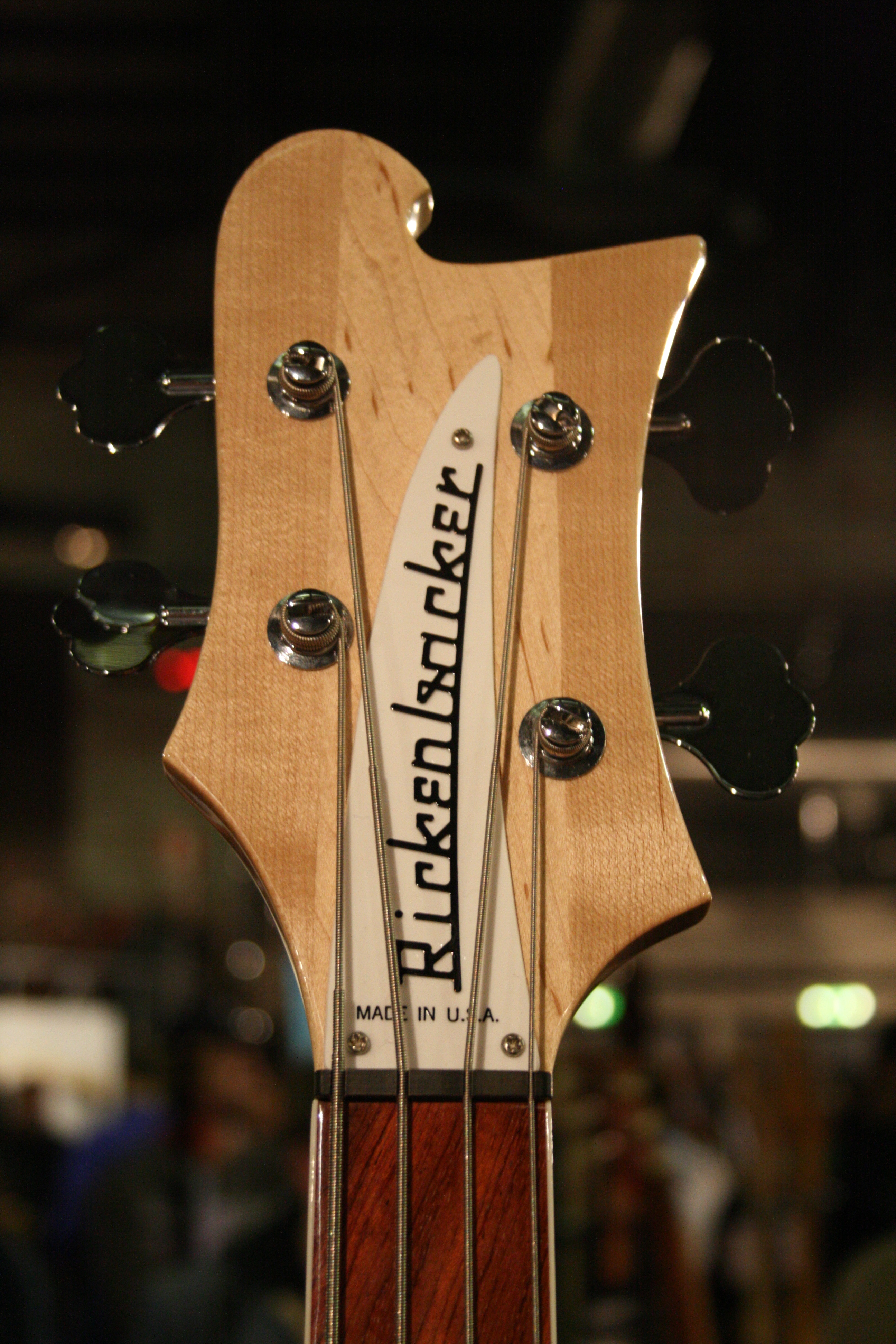 Rickenbacker